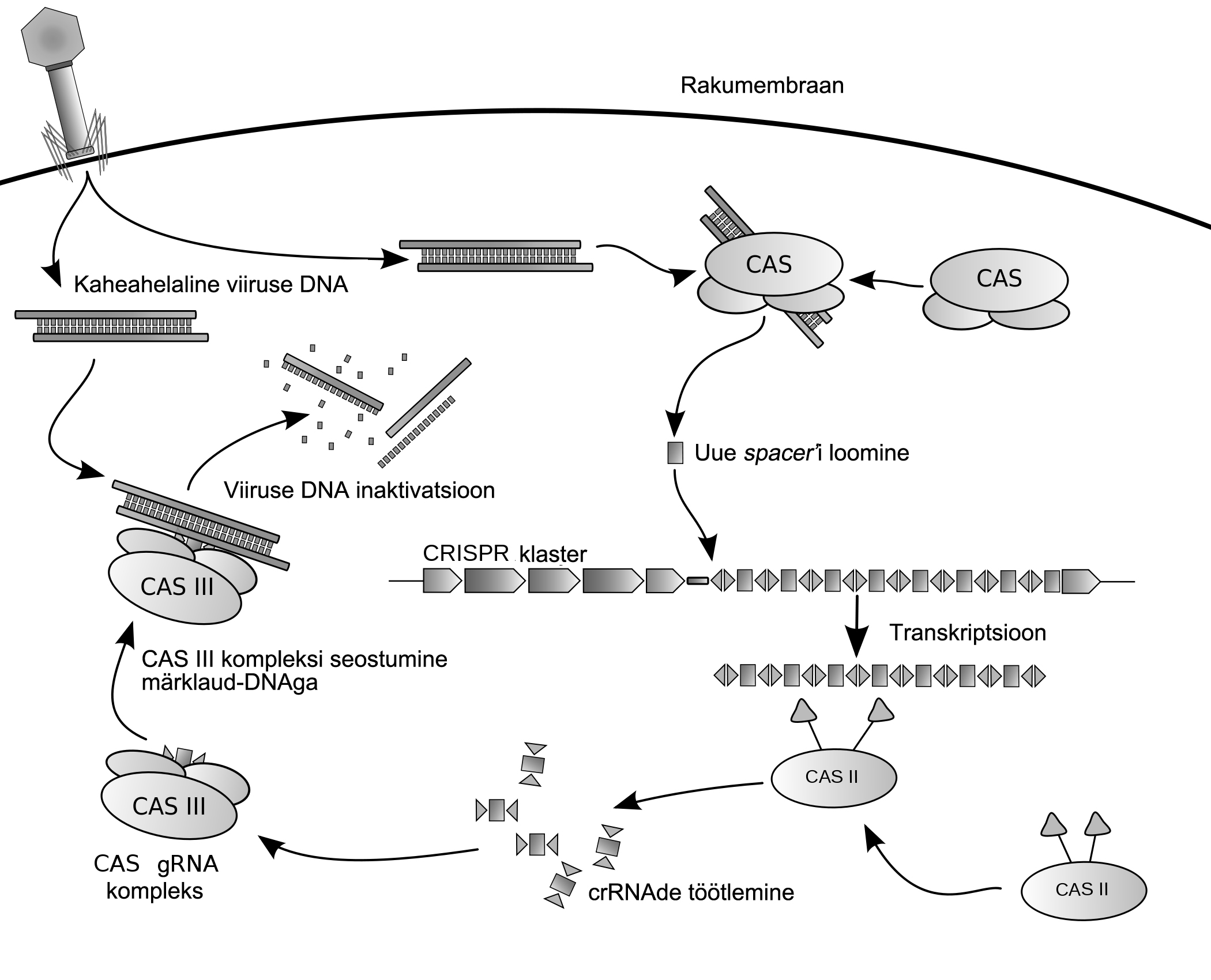 CRISPR mehhanismi üldine skeem